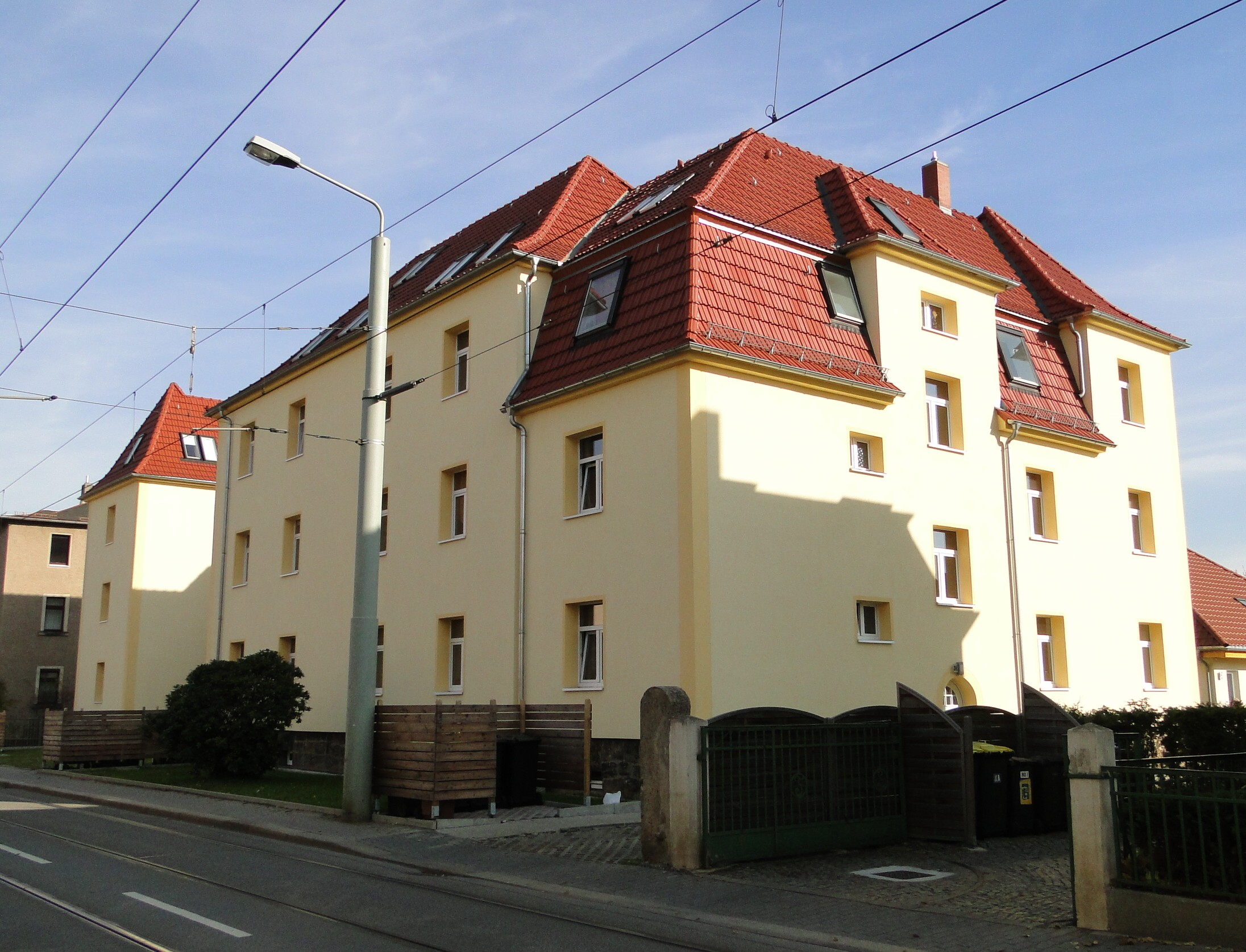 Stephensonstraße 34-36, die ersten Wohnungen der Baugenossenschaft Leuben aus dem Jahr 1912 nach Plänen von Alfons Girod